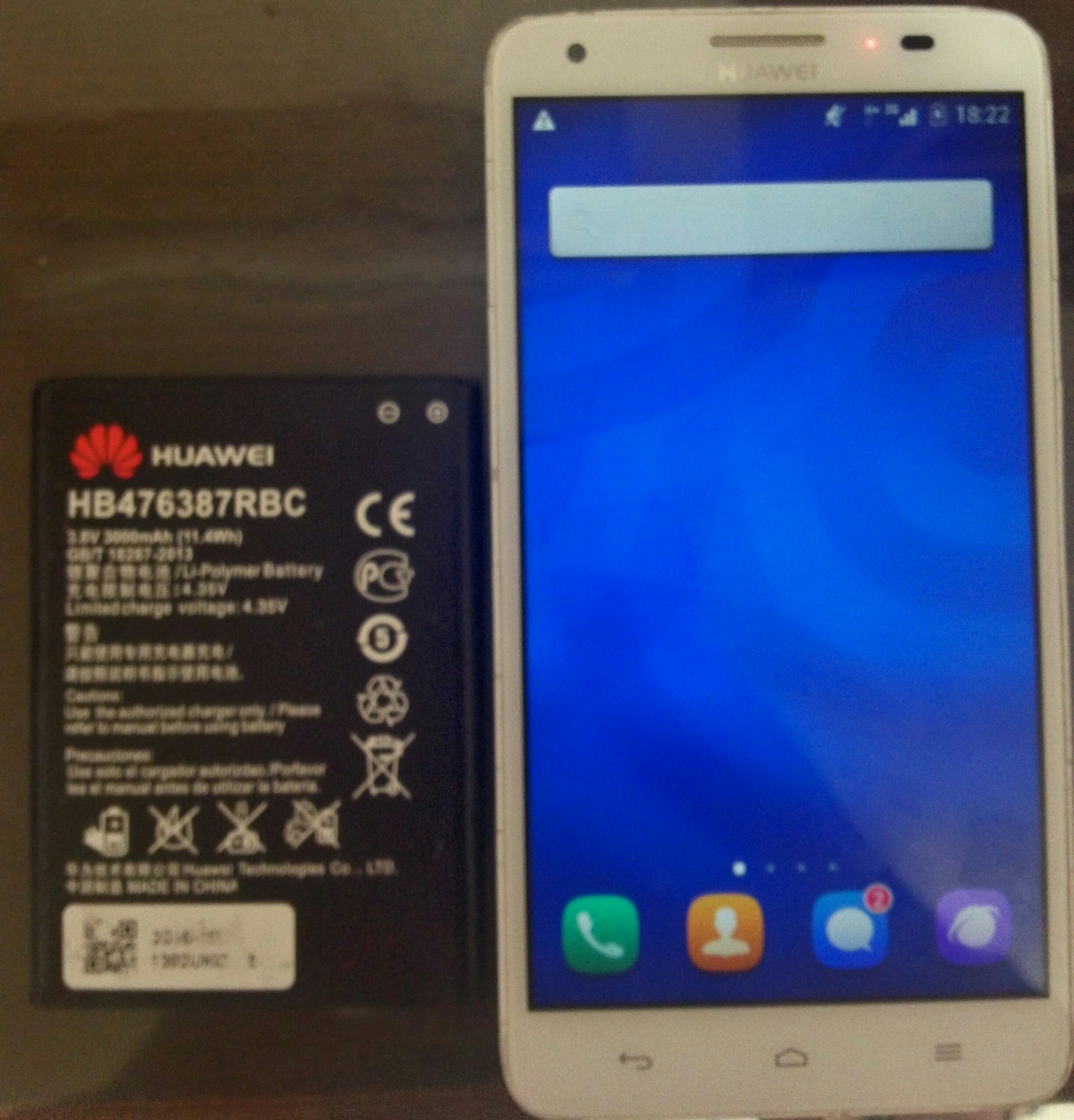 中文（台灣）: 損壞後的手機鋰電池在進行充電時會產生紅燈。有些電池容量會顯示一半或一些。即使顯示在進行充電，但在使用時並不擁有其表示的電量。